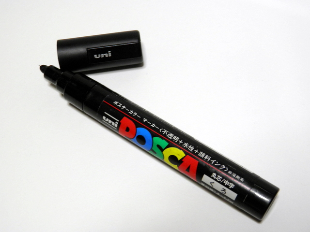 三菱鉛筆POSCA、中字黒色。